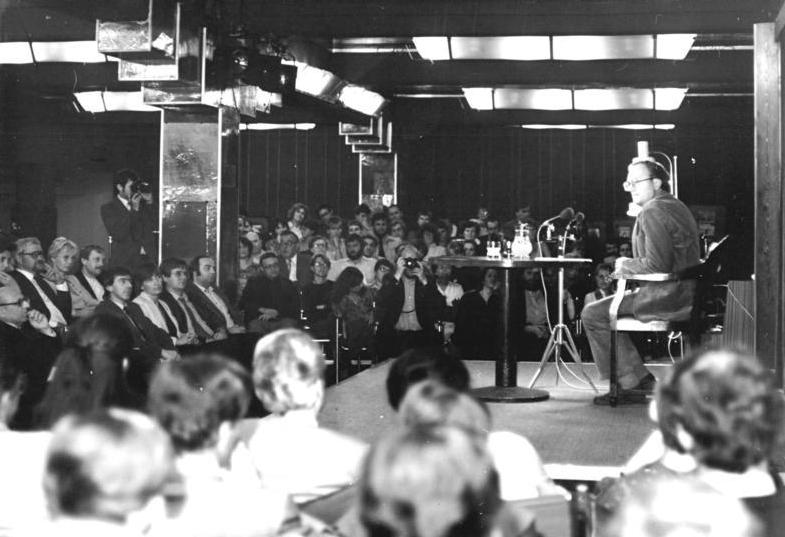 ADN-ZB Grubitzsch 17.9.83 Leipzig: Lesung aus Werken von Luther Am Vorabend des 5. Buchmarktes der Messestadt lasen im "academixer"- Keller in einer Veranstaltung des Reclam-Verlages die Schriftsteller Stephan Hermlin, Hermann Kant (r) und Günther Rücker aus Werken von Martin Luther.